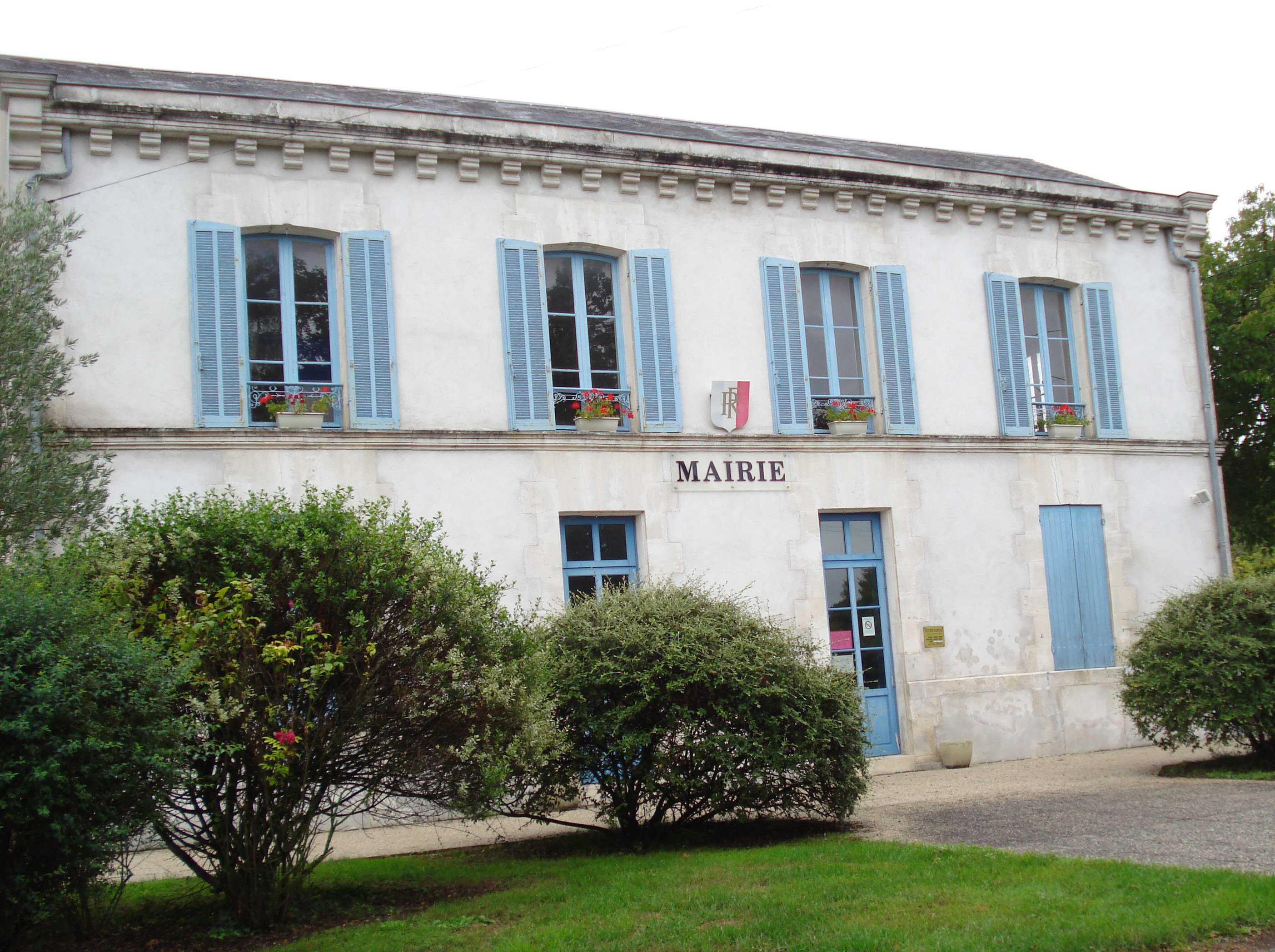 La mairie de Paillé (Charente-Maritime)